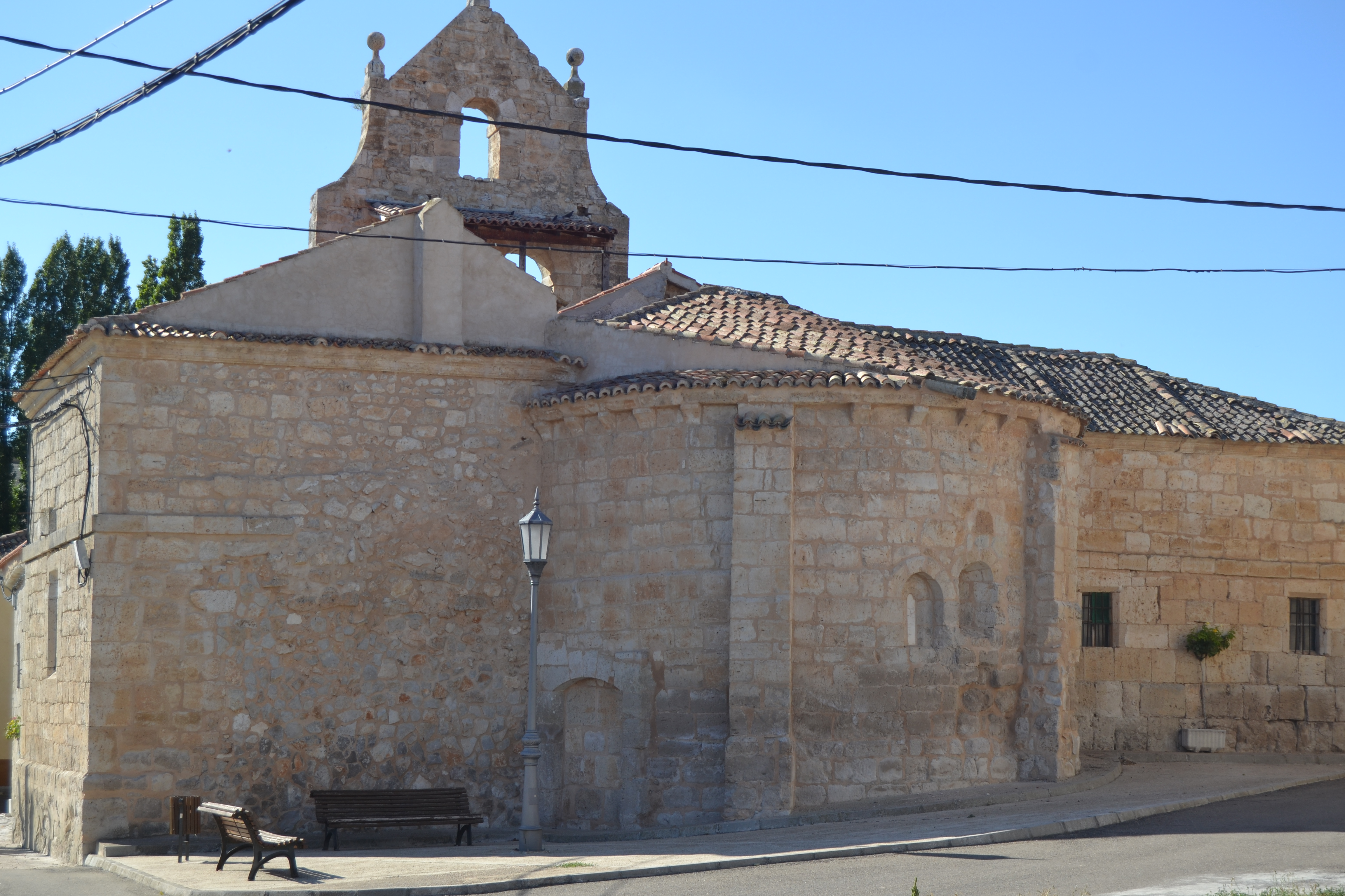 de estilo romanico